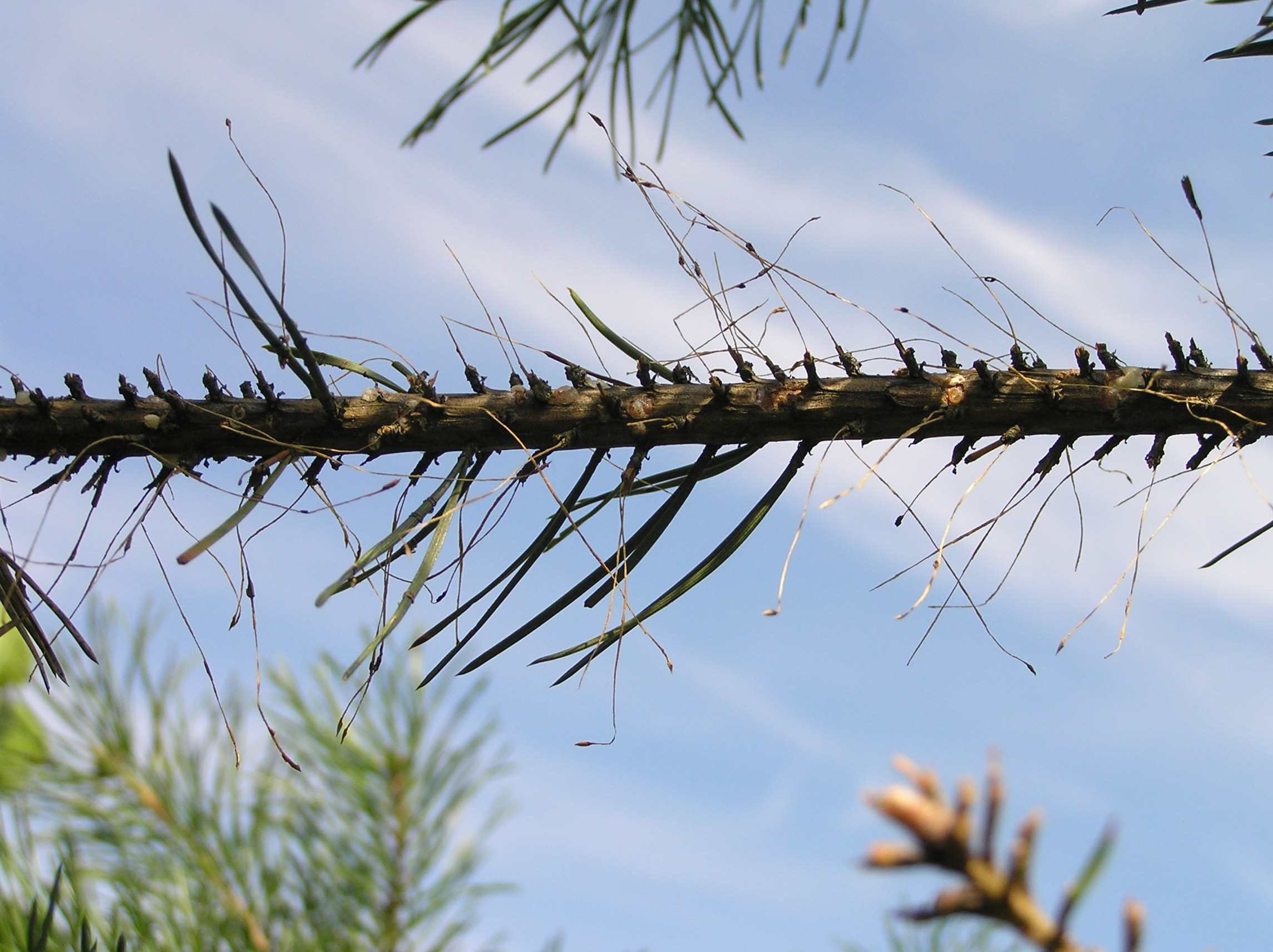 Diprion pini, Borecznik sosnowy, Polska